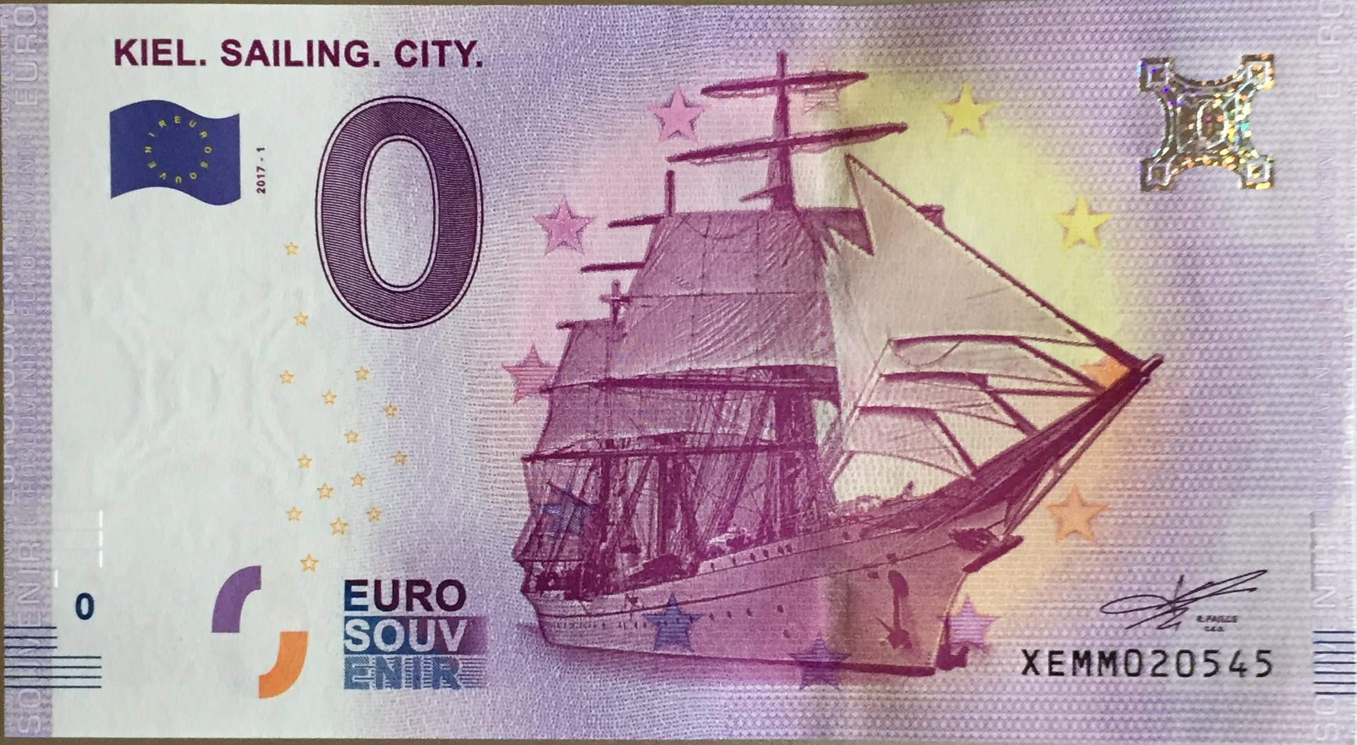 0-Euro-Schein der Stadt Kiel mit Abbildung der Gorch Fock (1958), unvollständig getakelt; "2017–1"